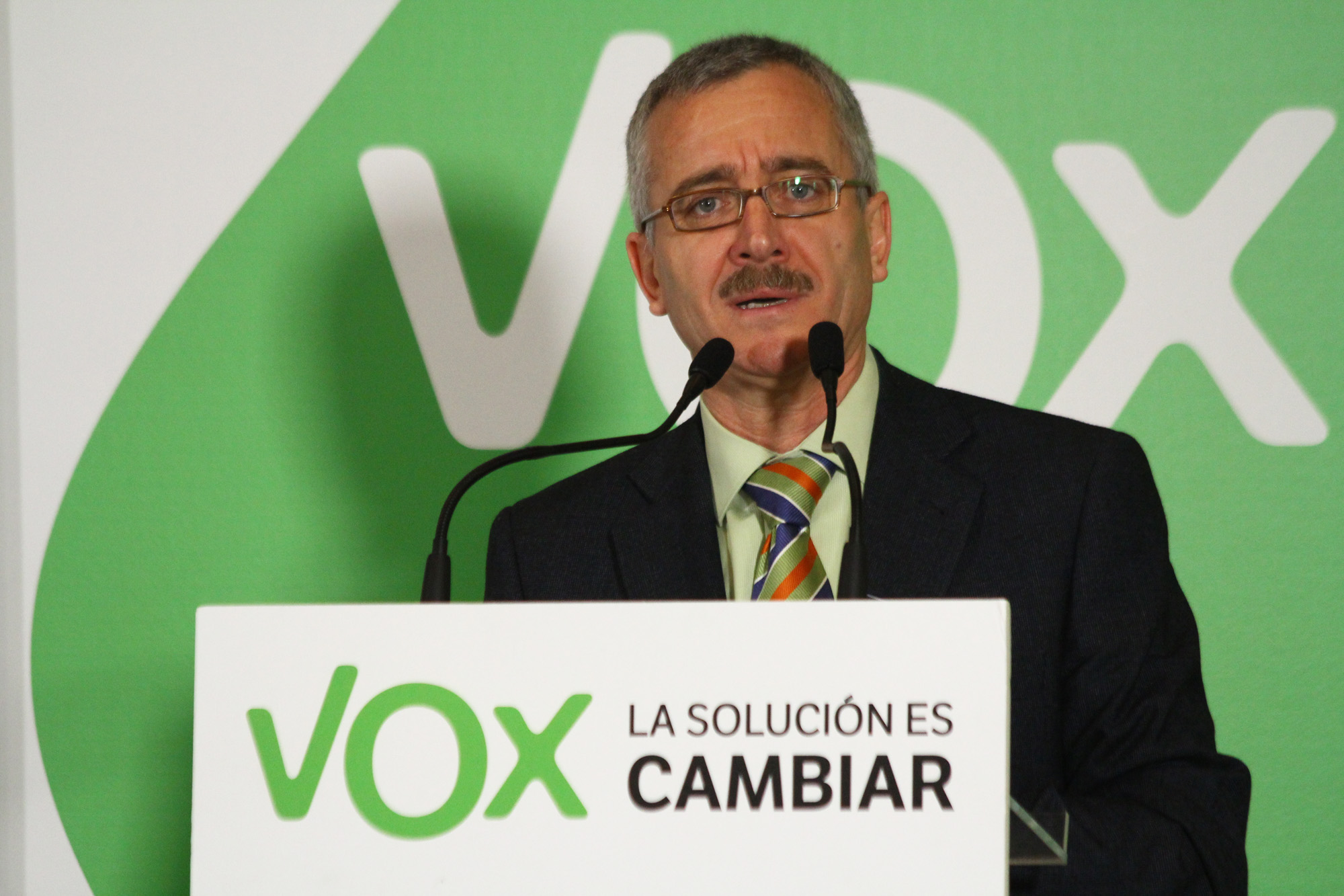 Acto de presentación del partido de centro-derecha Vox en Las Coruña. Intervinieron Francisco Javier Fernández Tarrío, coordinador de Vox en La Coruña; José Antonio Ortega Lara y el secretario general de Vox, Santiago Abascal.